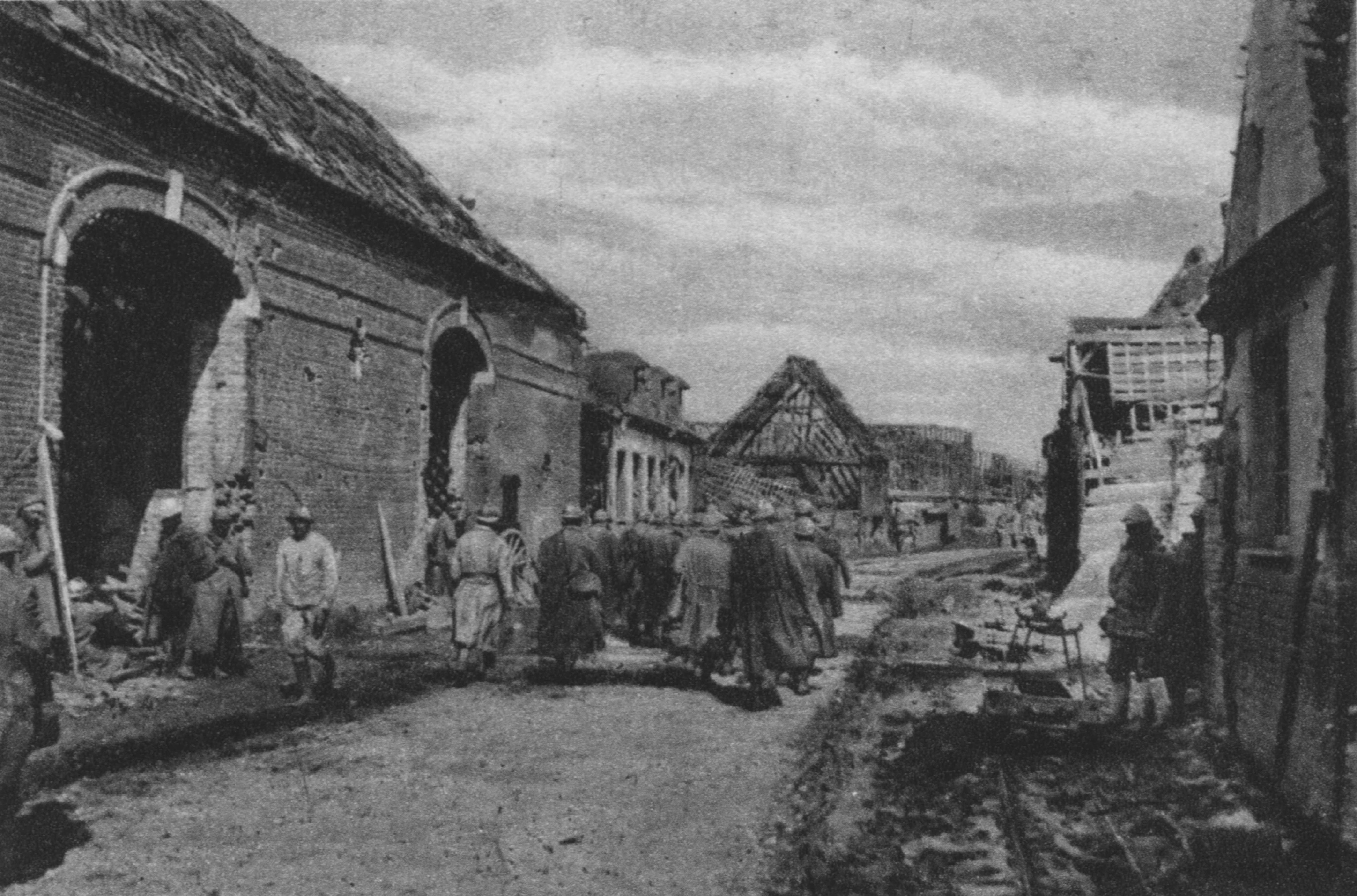 In fortschreitenden Kämpfen gelang es den französischen Truppen, am 2. Juli 1916 den Ort Herbécourt, der in der deutschen zweiten Linie lag, zu nehmen.